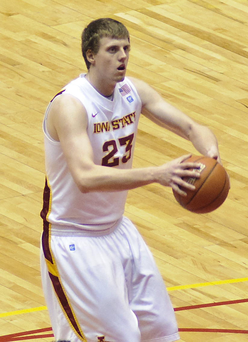 Jamie Vanderbeken